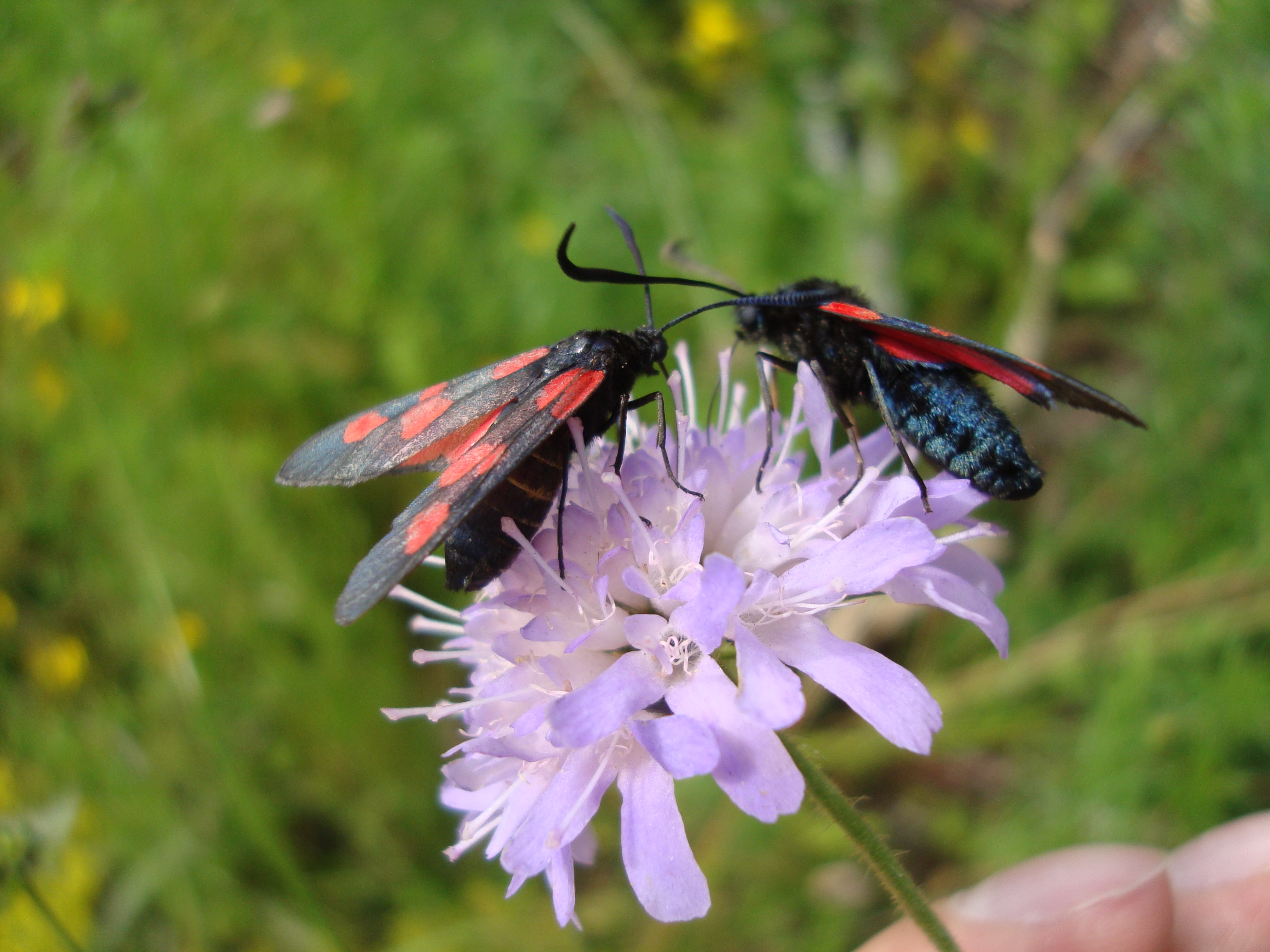 Kraśnik pięcioplamek (Zygaena trifolii) - dwa osobniki na roślinie, ujęcie z boku, Poland